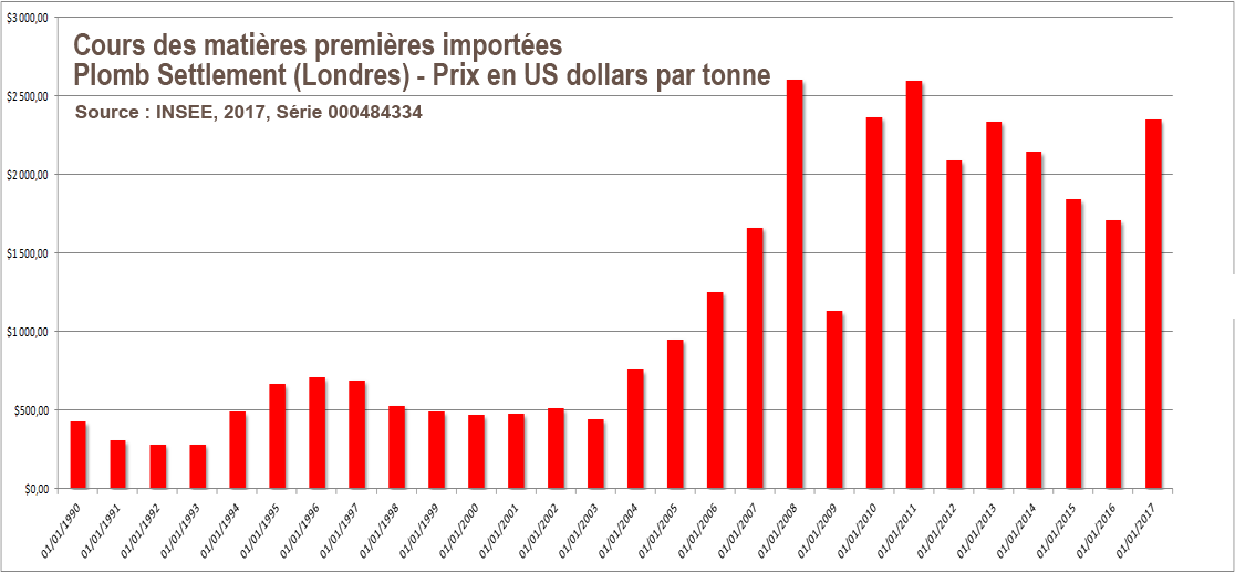 Evolution temporelle du prix (en début d'année) du plomb selon le cours des matières premières importées - Plomb Lead Settlement (Londres) - (Prix en US dollars par tonne) d'après données collectées par l'INSEE en France ; série mise à jour le : 18/05/2017 et disponible mois par mois